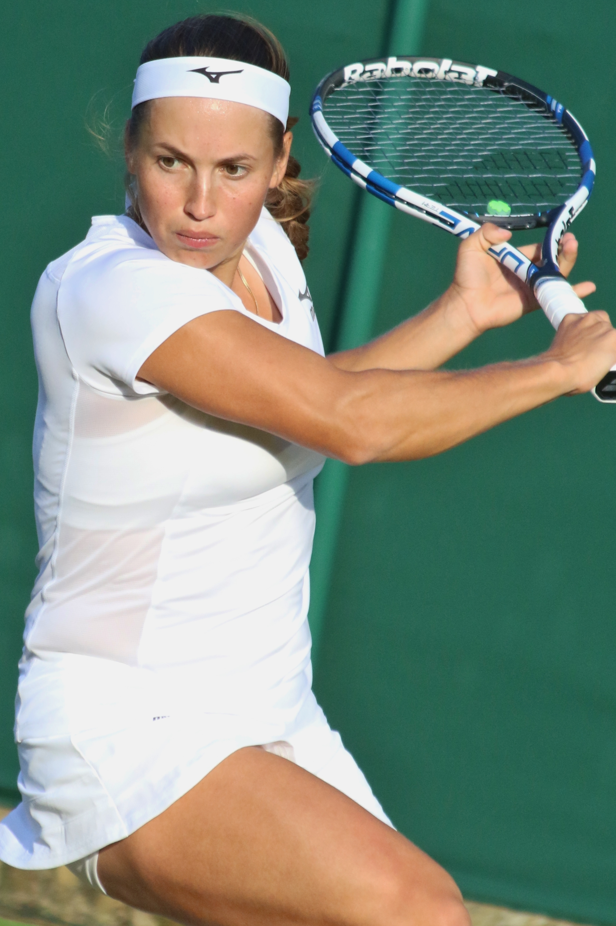 Putintseva WM17 (8)